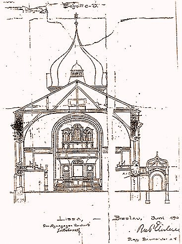 Nowa Synagoga w Lesznie